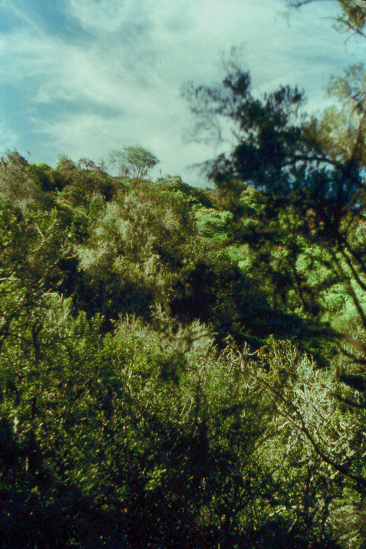 Imagen parcial de los Tiles de Moya, Gran Canaria, en 1985. Diapositiva realizada con cámara Practika BMS.